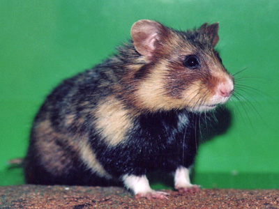 Hamster Commun